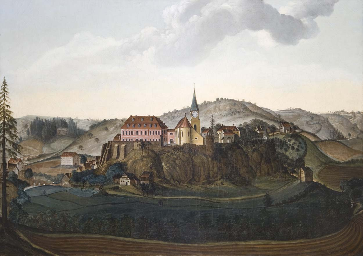 Vom Maler Rabusky, Thaddäus (1776 Neustadt an der Waldnaab - 1862 ebenda): "Weite Oberpfälzer Landschaft" Öl auf Leinwand, signiert, Craquelé, 83x117 cm (32 5/8 x 46 in), alt doubliert